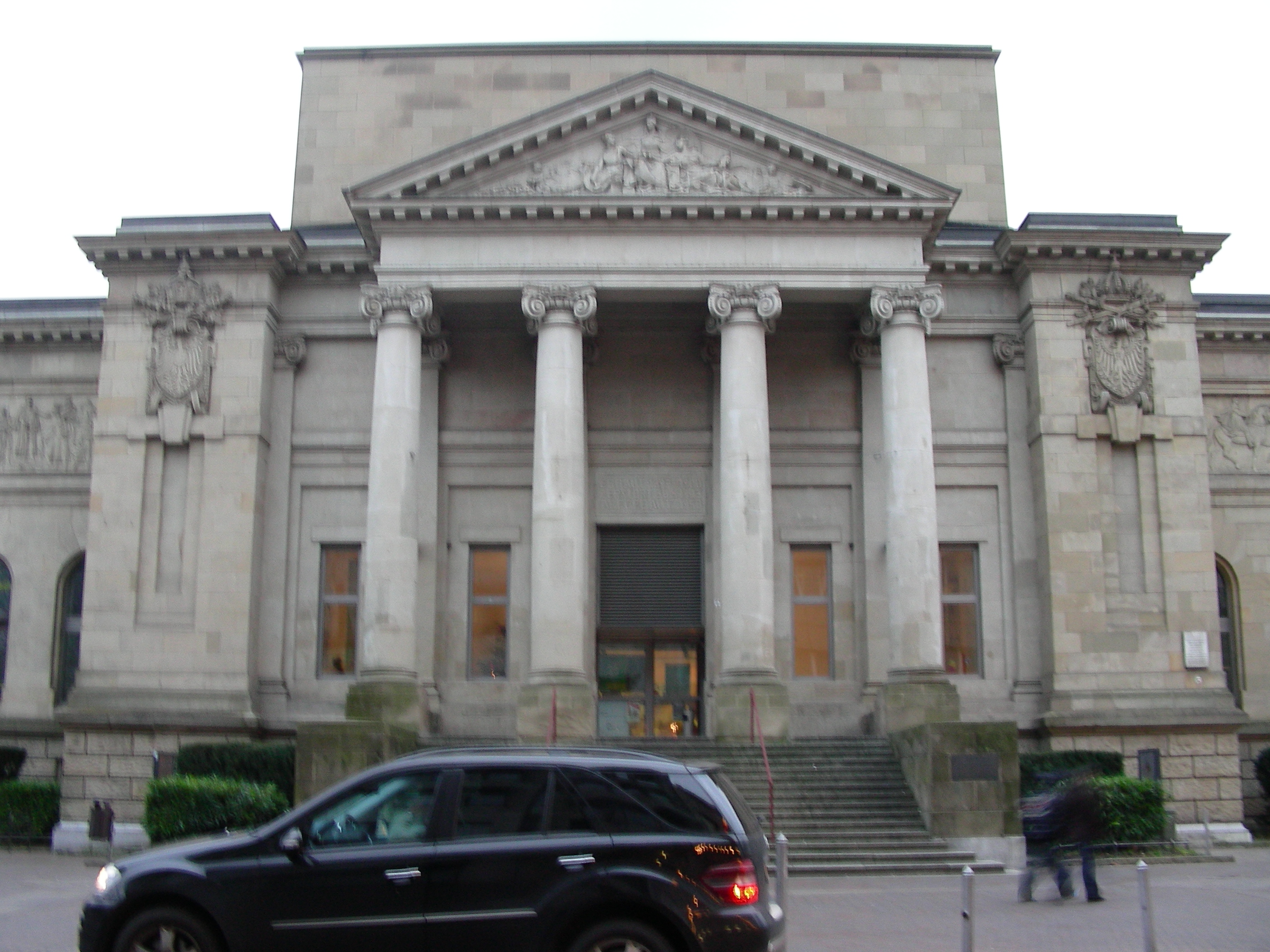 Haus der Jugend Wuppertal (ehemalige Barmer Ruhmeshalle)